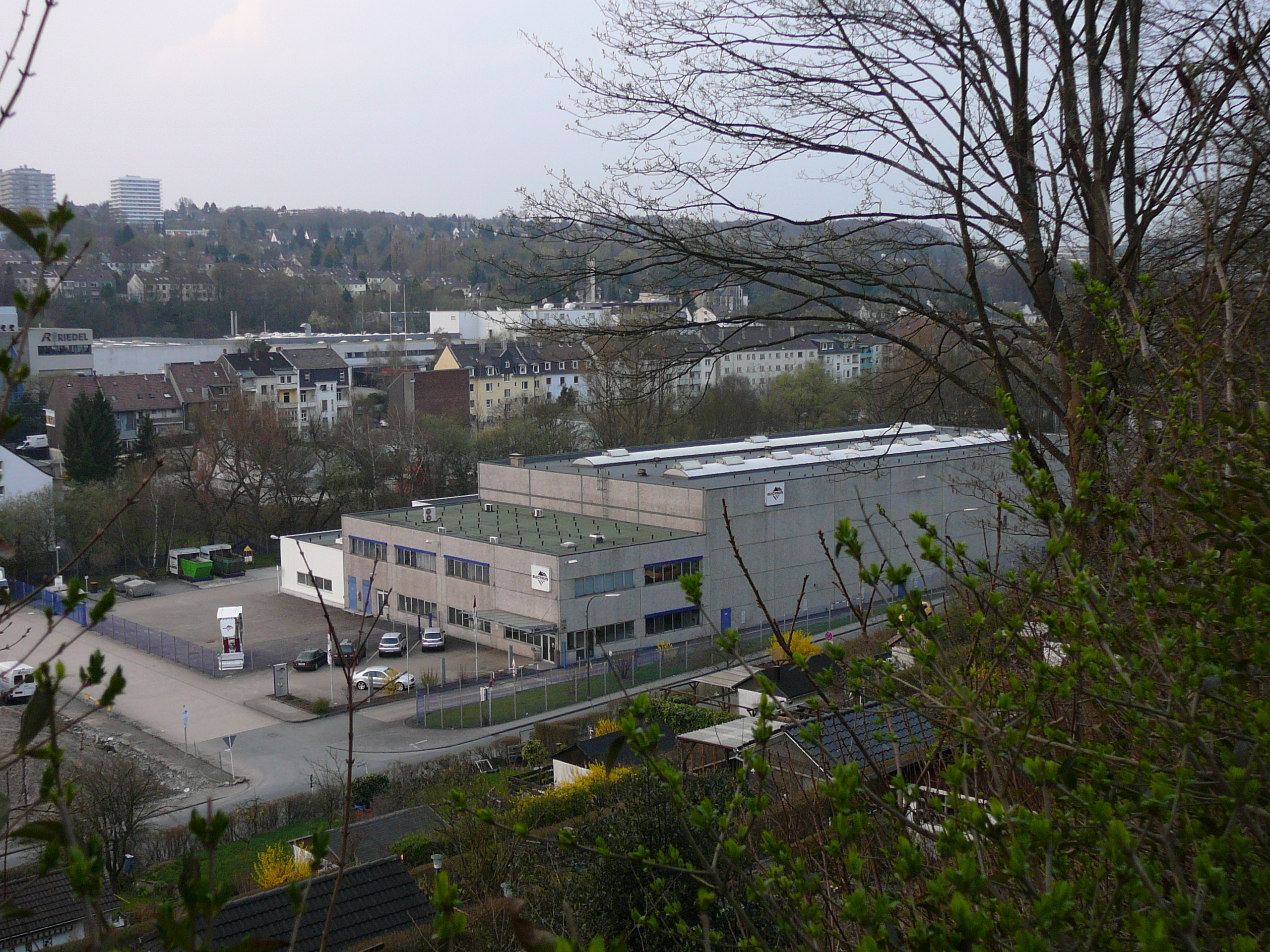 Am Weinberg, Wuppertal